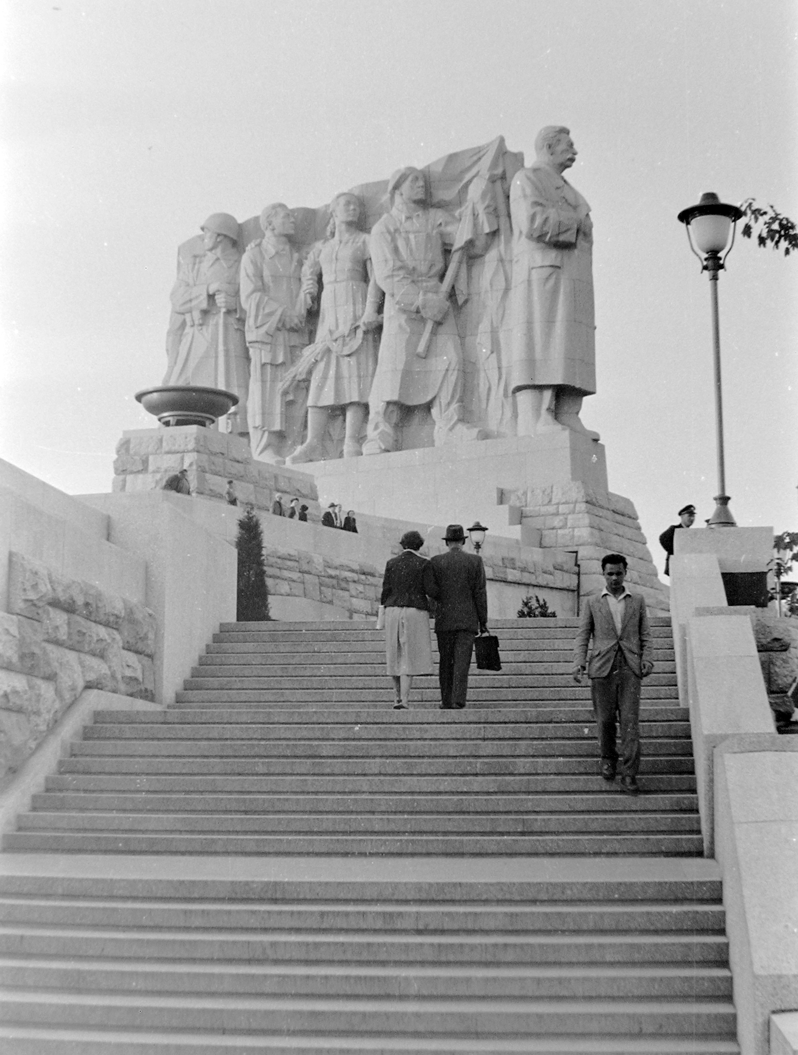 Letna-park. Európa legnagyobb, 30 méteres Sztálin szobra volt (állt 1962-ig). Ma egy 25 méteres, működő metronóm van a helyén. Location: Czech Republik, Prague Tags: Joseph Stalin portrayal, monument, sculpture, Czechoslovakia Title: Letna-park. Európa legnagyobb, 30 méteres Sztálin szobra volt (állt 1962-ig). Ma egy 25 méteres, működő metronóm van a helyén.